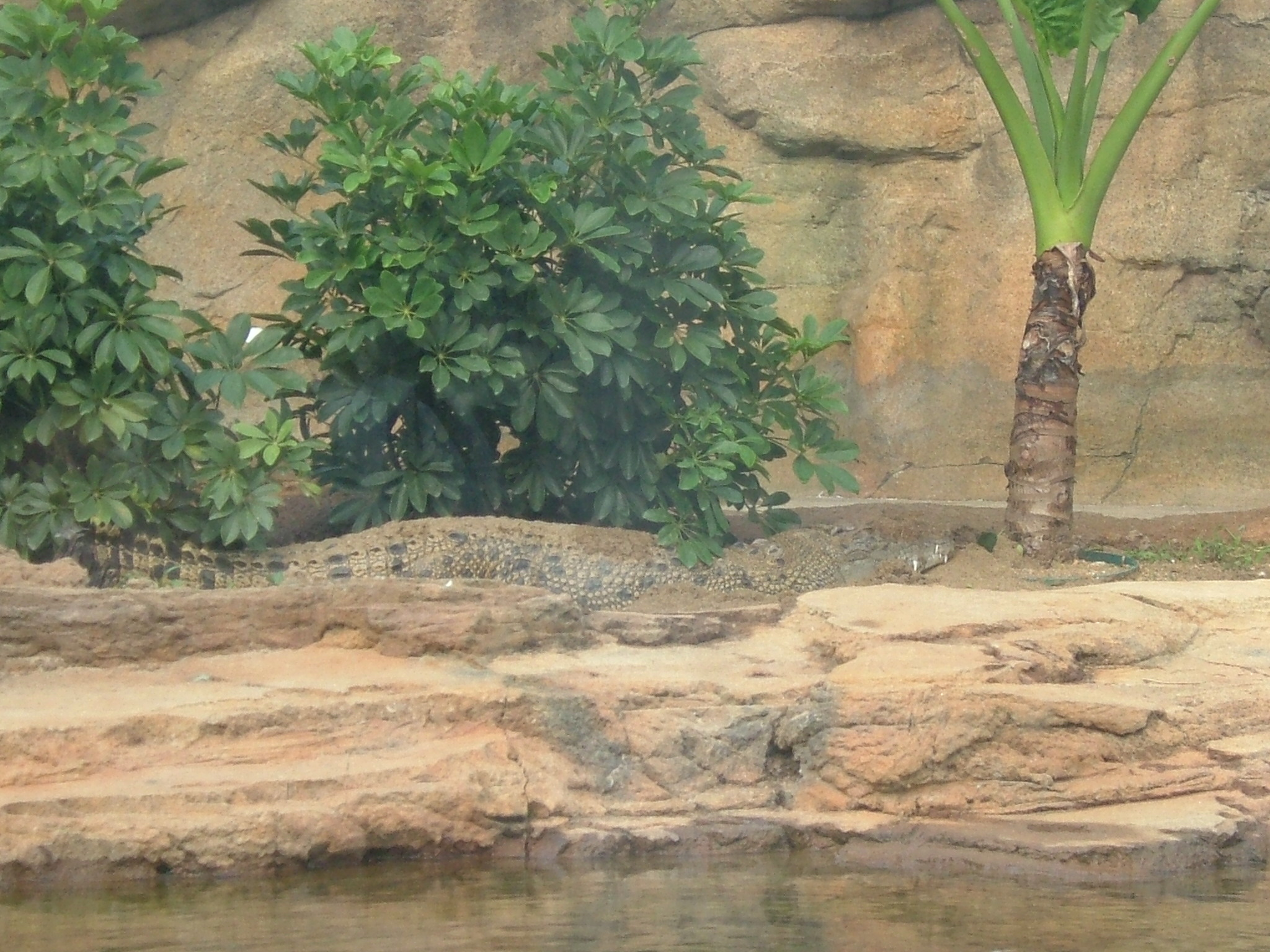 貝貝 (Crocodile Pui Pui)